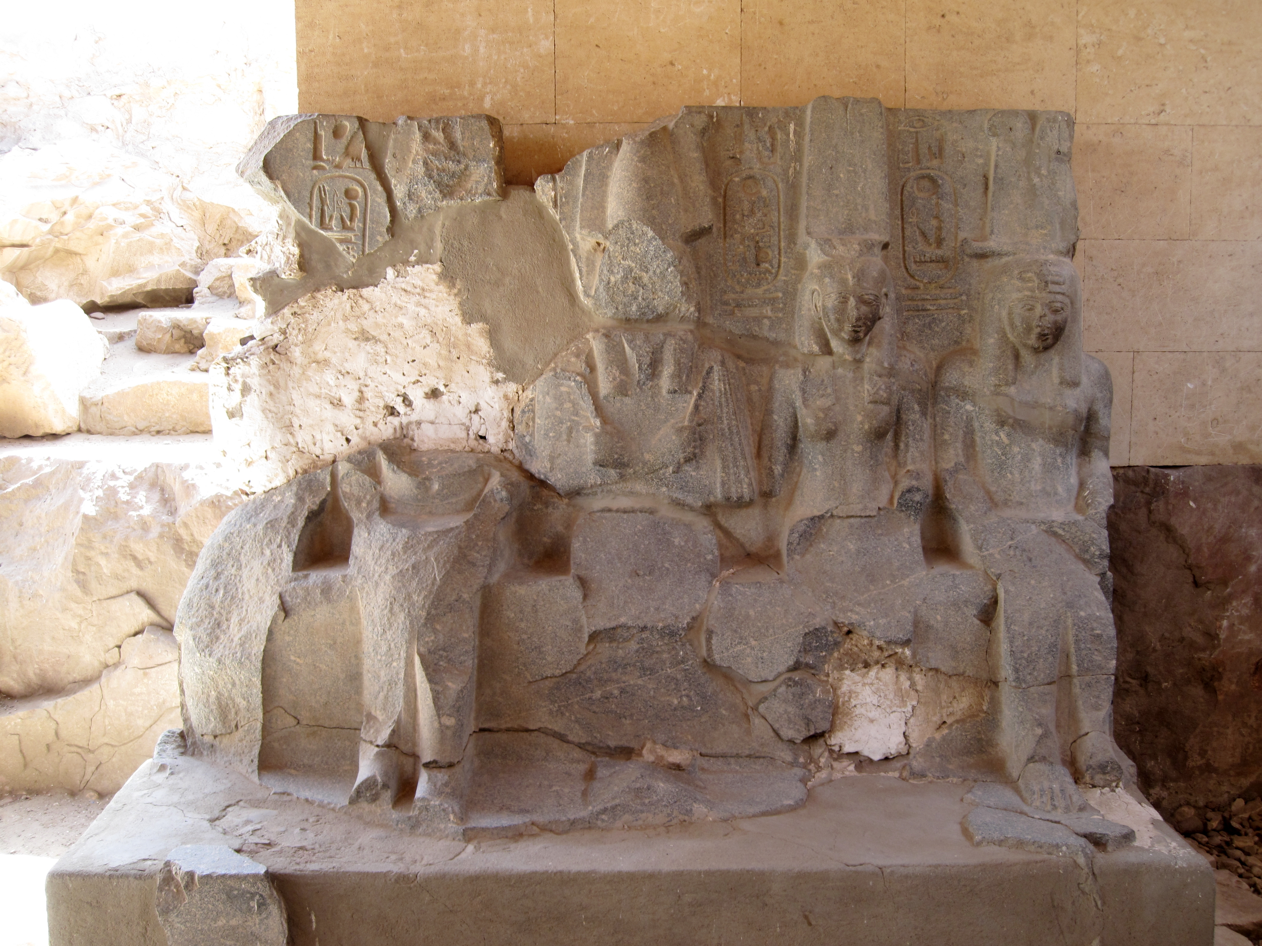 Statuengruppe aus dunklem Granit mit Ramses II., Horus, Osiris, Isis und Sethos I. im zentralen Schrein im Tempel Ramses II. in Abydos, Ägypten